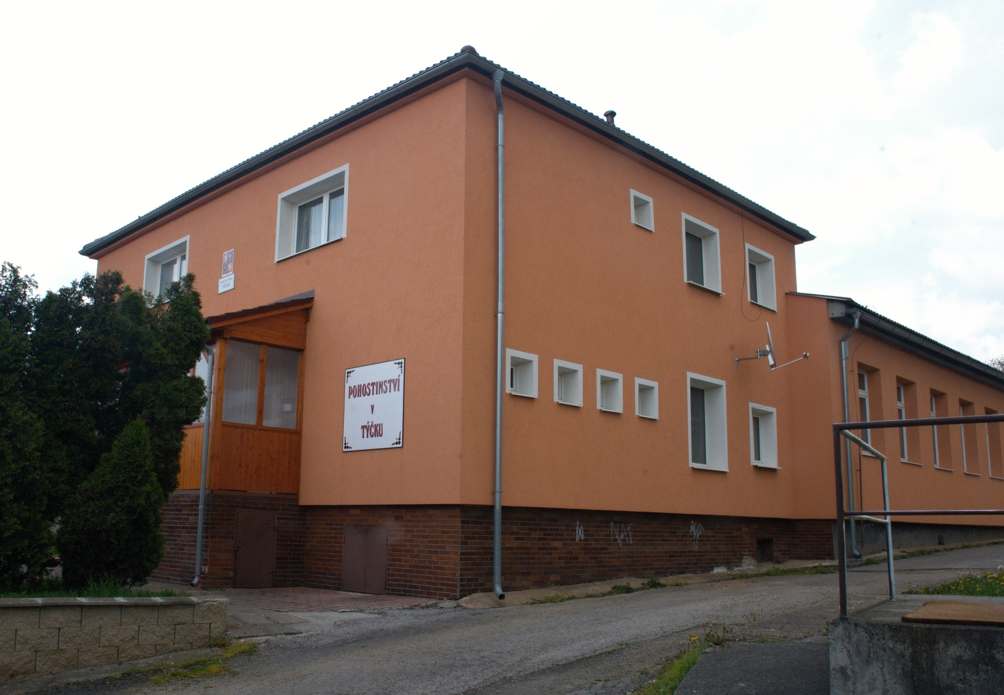 obecní úřad a hospoda